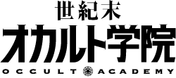 Logo oficial de la serie de anime Seikimatsu Occult Gakuin.